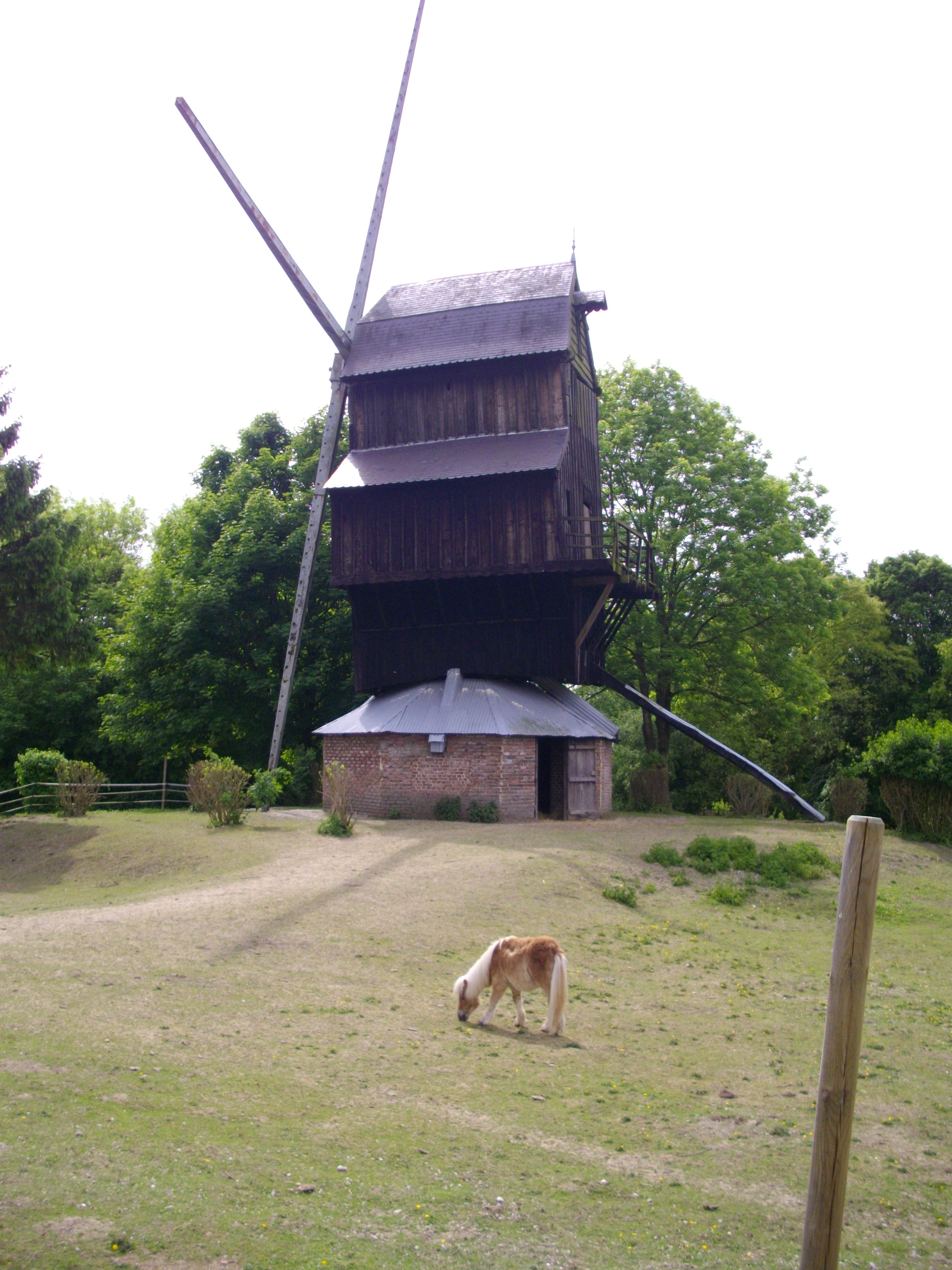 Moulin de Westmolen à Naours (80) - Site des Grottes de Naours